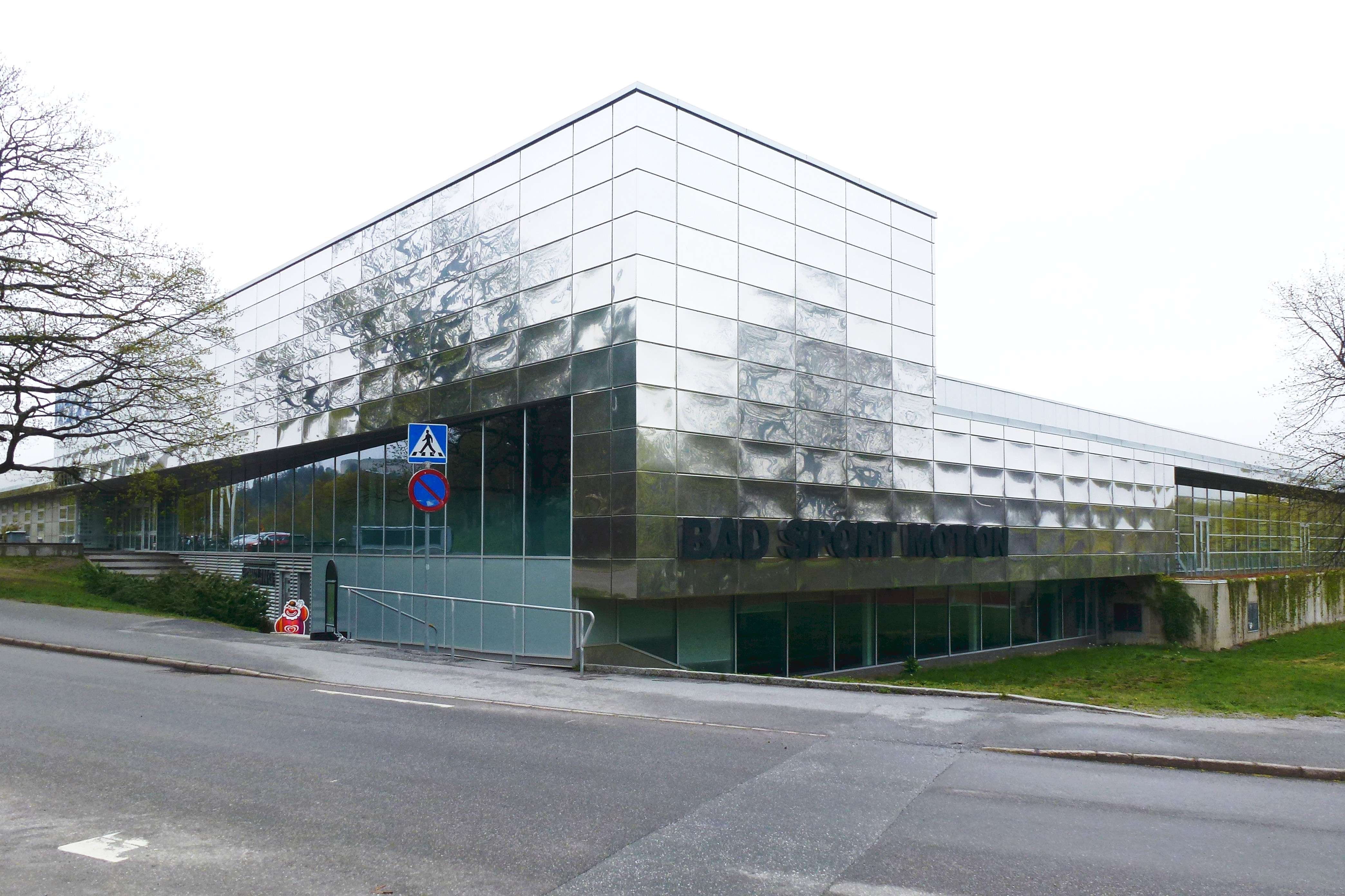 Sollentuna sim- och sporthall, arkitekt Gustaf Rosenberg (Kasper Salin-priset 1976).